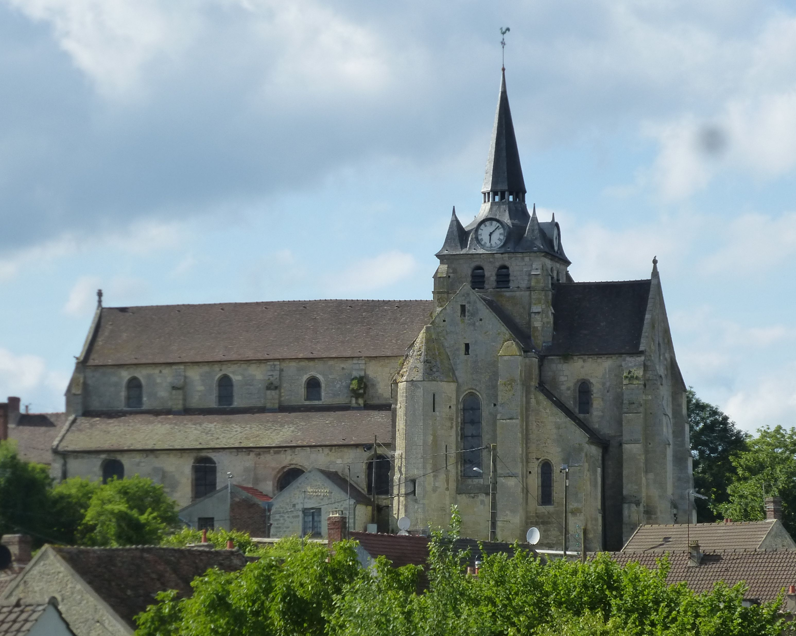 Église Saint-Martin de Mareuil-sur-Ourcq. (Oise, Picardie).